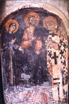 Фреска в "Свети Йоан Богослов", Бер, Гърция.